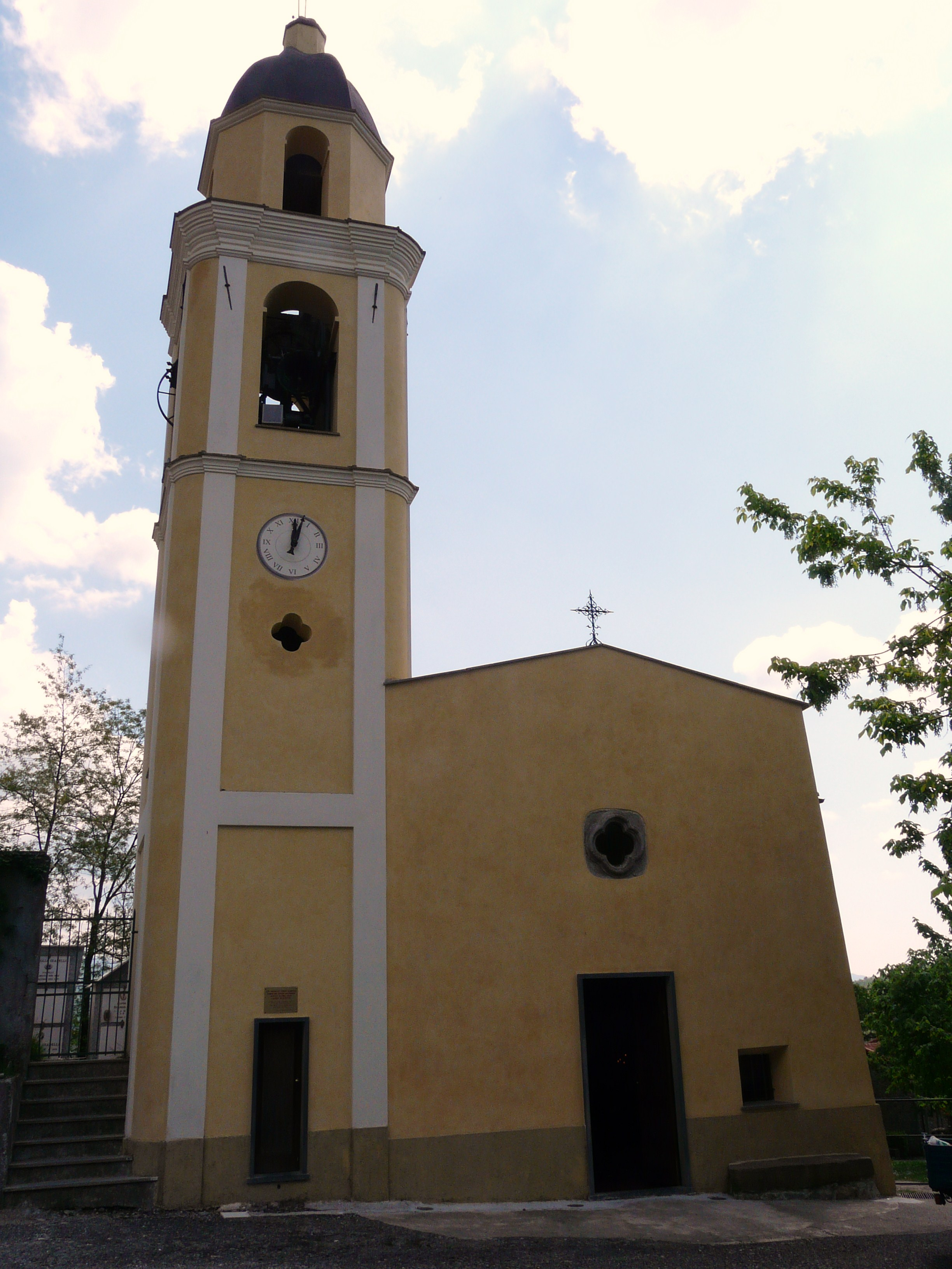 Facciata del santuario di Cerreta, Carro, Liguria, Italia